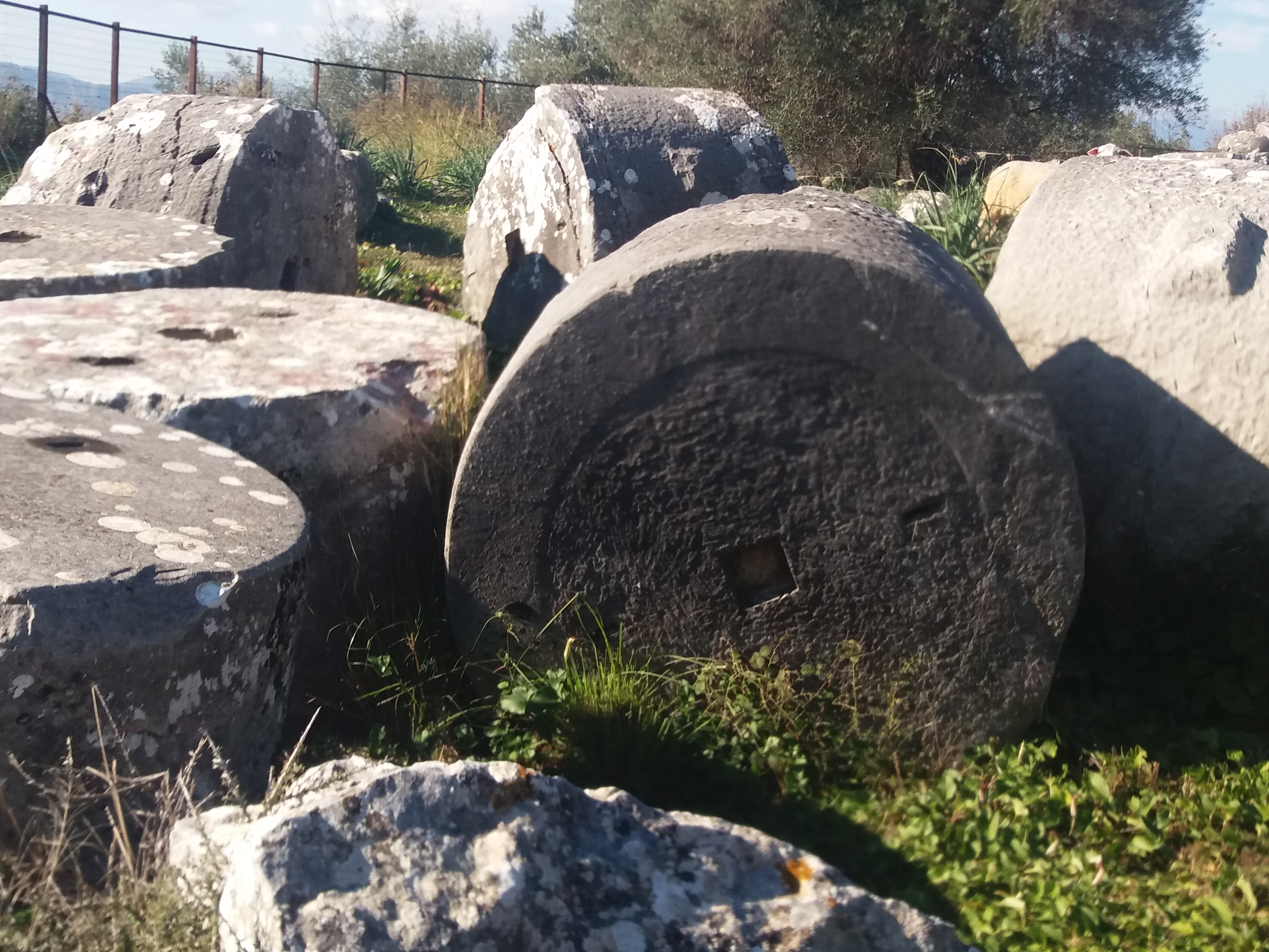 Ναός Στρατίου Διός«Ναός Στρατίου Διός»